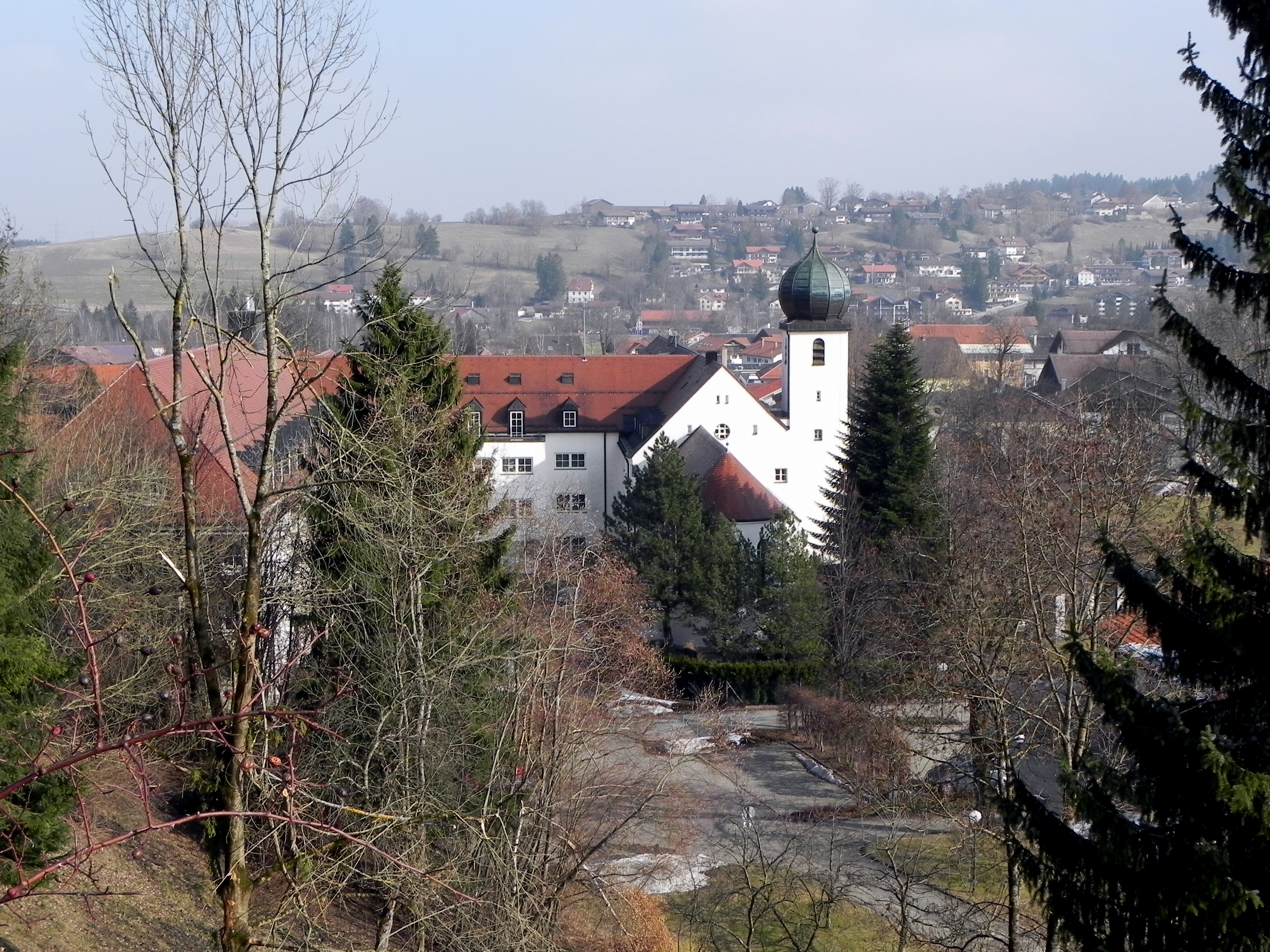 St. Vinzensklinik